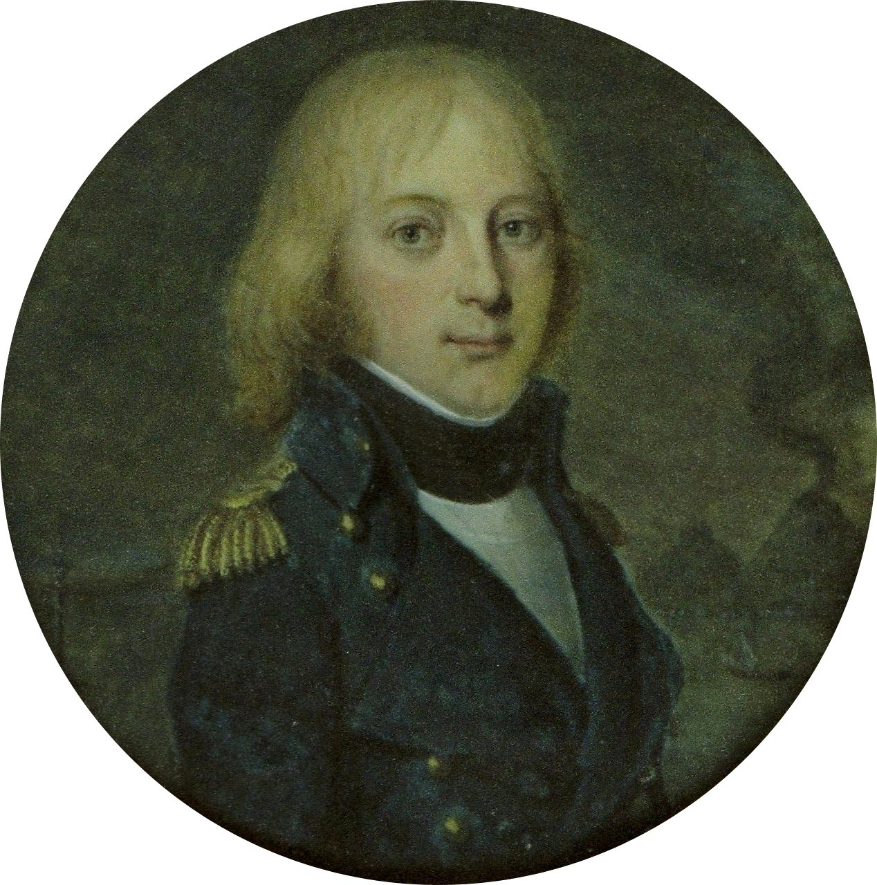 Nicolas François Conroux (1770-1813), général de division et baron de l'Empire.